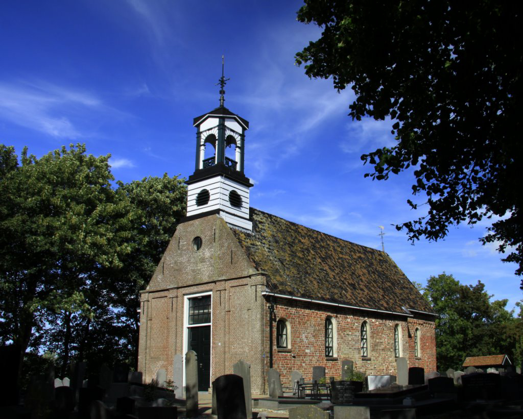 De éénbeukige Romaanse kerk uit ca. 1200 in Aalsum. De kerk staat op een gedeeltelijk afgegraven terp in het wel zeer kleine dorpje vlak boven dokkum in de Gem. Dongeradeel. Op de westgevel staat een leuk torentje met daar in een luid klokje uit 1499. Het kerkje heeft de status van Rijksmonument.